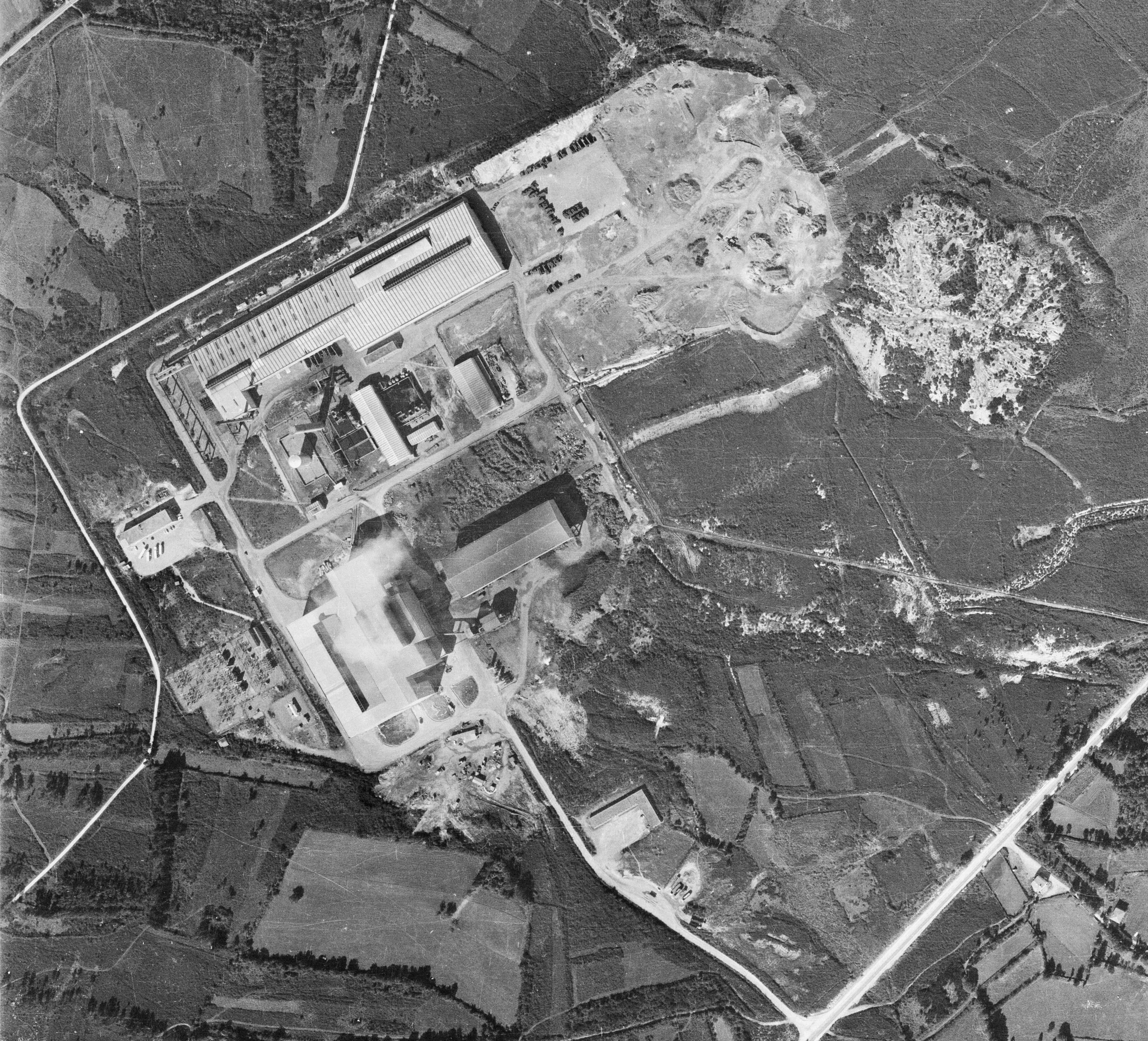 Vista aérea de Sidegasa, Teixeiro, Curtis, Galiza.